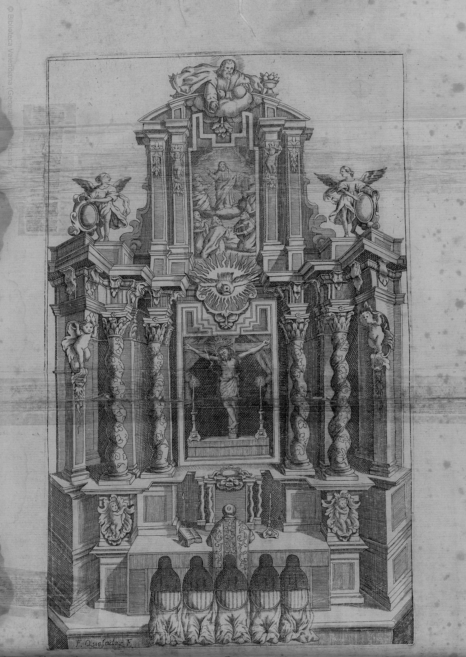 Identidad de la imagen del S. Christo de S. Salvador de Valencia, con la sacrosanta ... de Berito en la Tierra Santa... en tres tratados...: con el cathalogo de las vidas de todos los obispos y arçobispos... / su autor el doctor Iuan Bautista Ballester . En Valencia por Gerónimo Vilagrasa, 1672. Grabado calcográfico firmado por Francisco Quesádez.